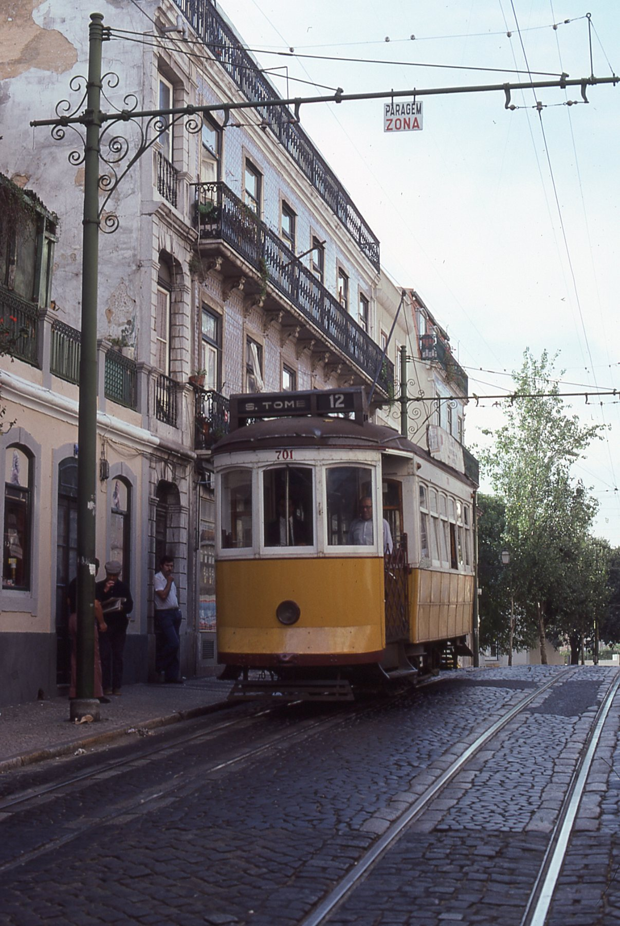 Ligne 12, direction S. TOME (cette ligne existe encore à ce jour) Le tram 701 fait partie de la série 701-735, il a été transformé en 1995-1996, il circule encore à ce jour, sous le no 582